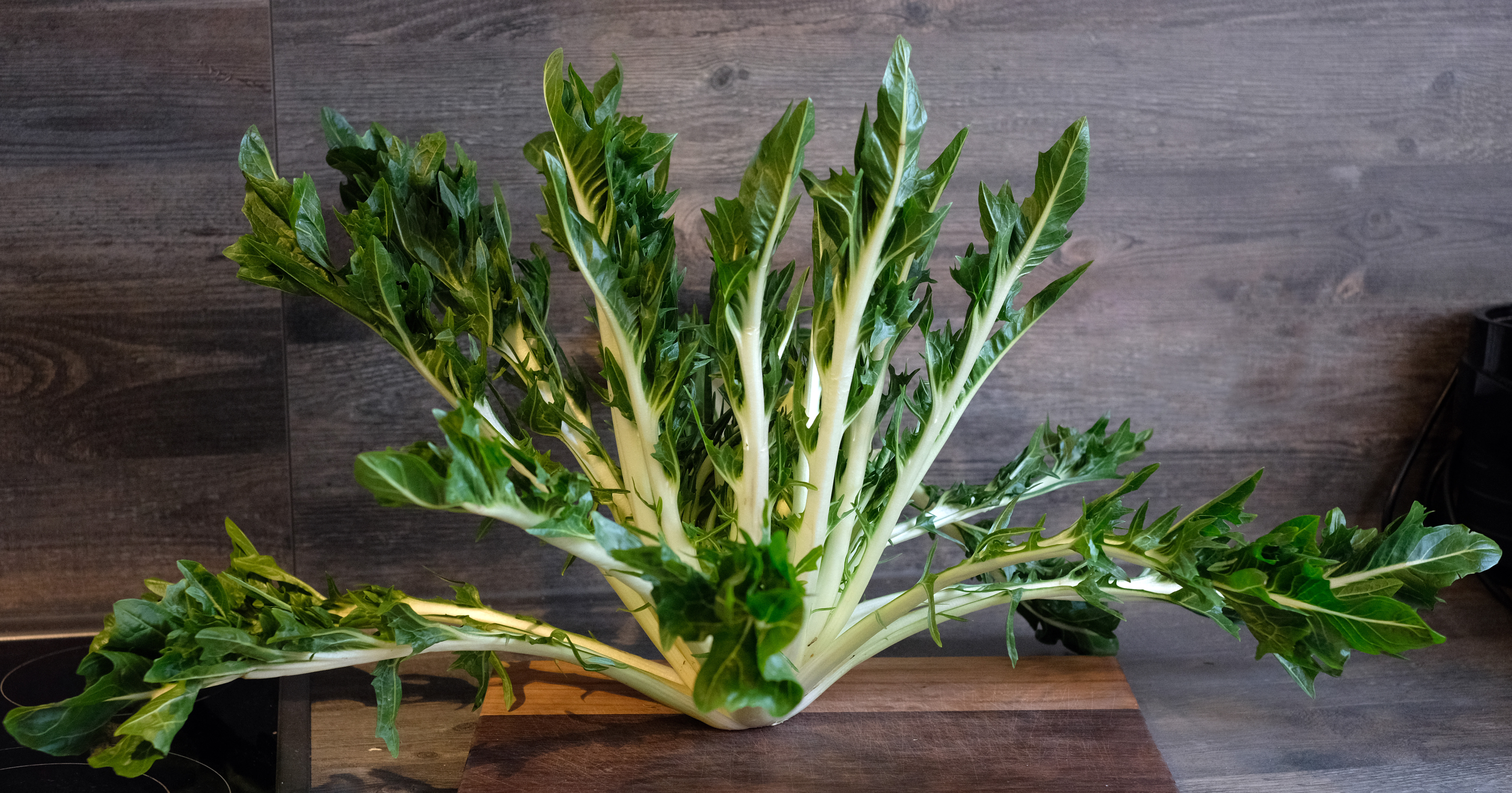 Eine Puntarelle, dem natürlichen Wuchs entsprechend aufgerichtet, um die normale Blattstellung zu simulieren.